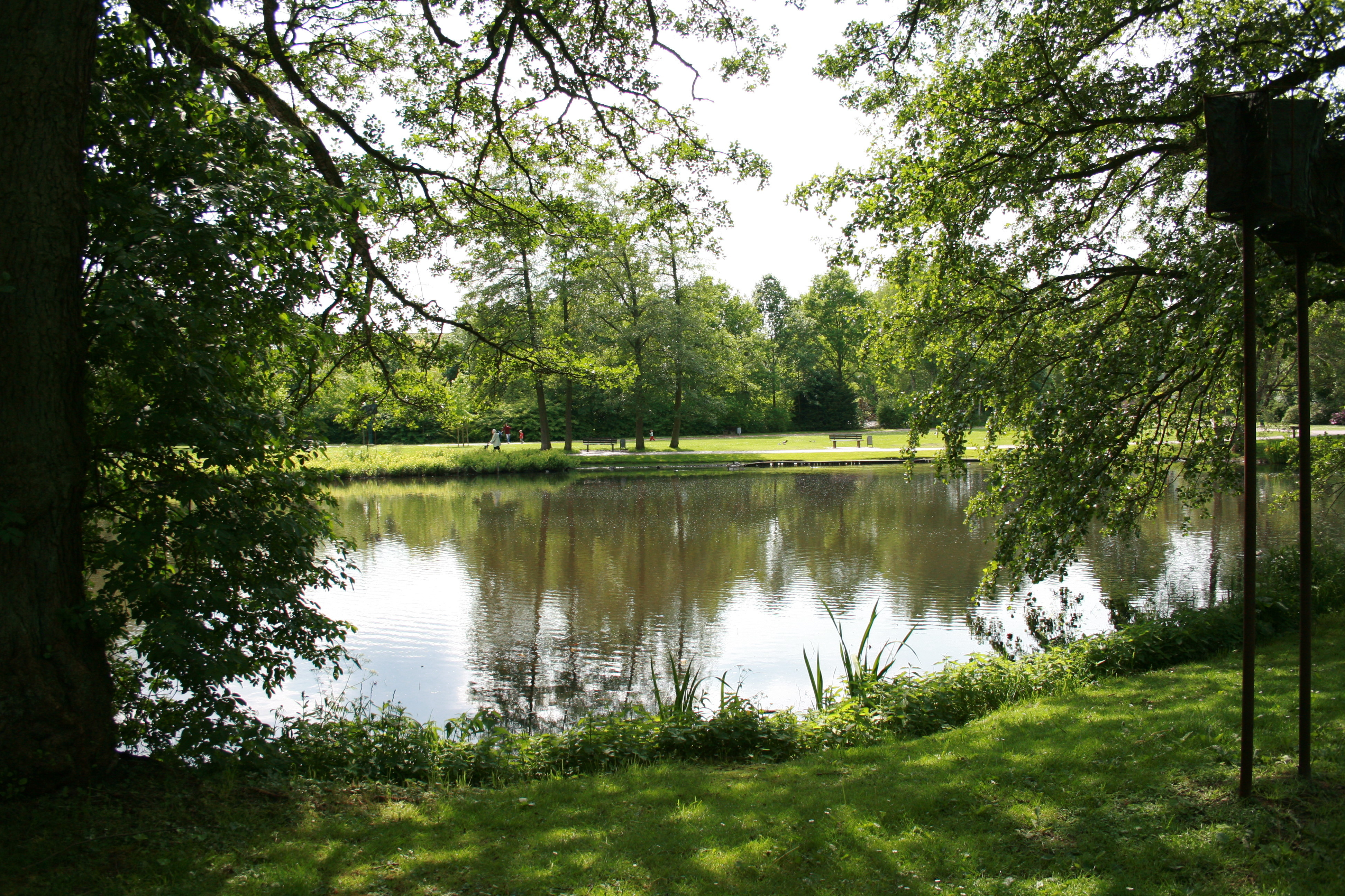 Mühlenteich der Örtze in Munster (Örtze)